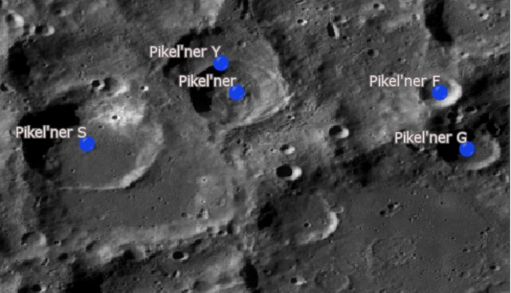 Cráter lunar Pikel'ner. Cráteres satélite. (Imagen LRO)